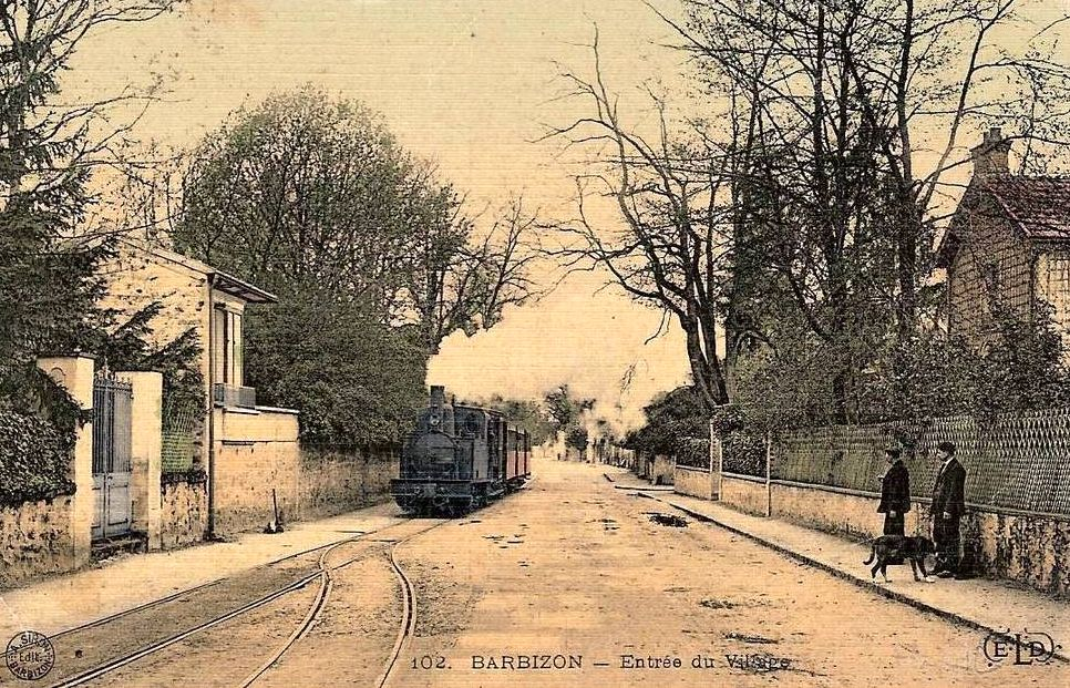 Train s'approchant du terminus de Barbizon.